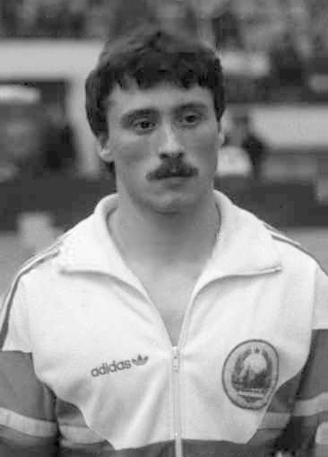 Marian Rizan la Campionatele Internationale de Gimnastica, gazduite de Sala Sporturilor din Constanta.